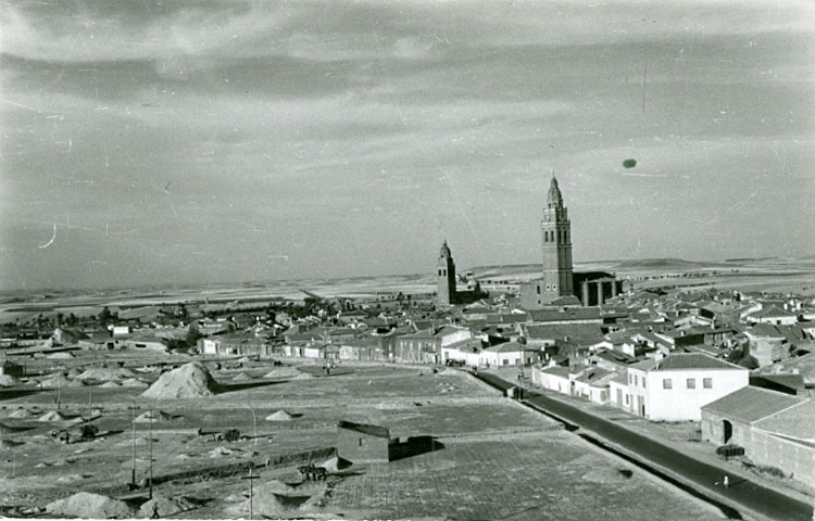 Vista panorámica - Alaejos (Valladolid) - Postal B/N